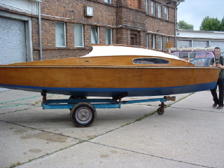 Beispiel für einen Knickspant, Ort: Brandenburg a. d. Havel